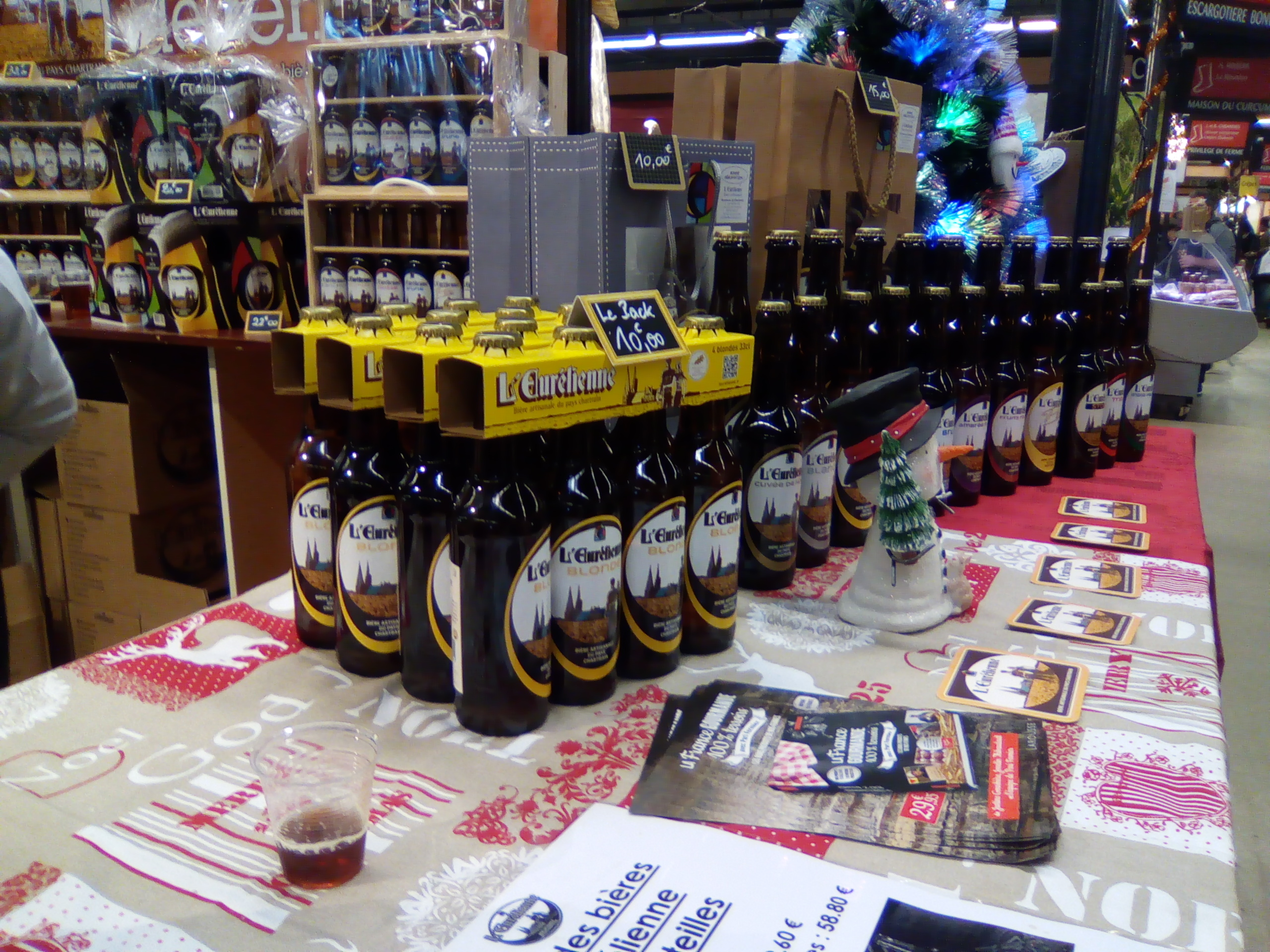 Marché de noël Pari fermier.